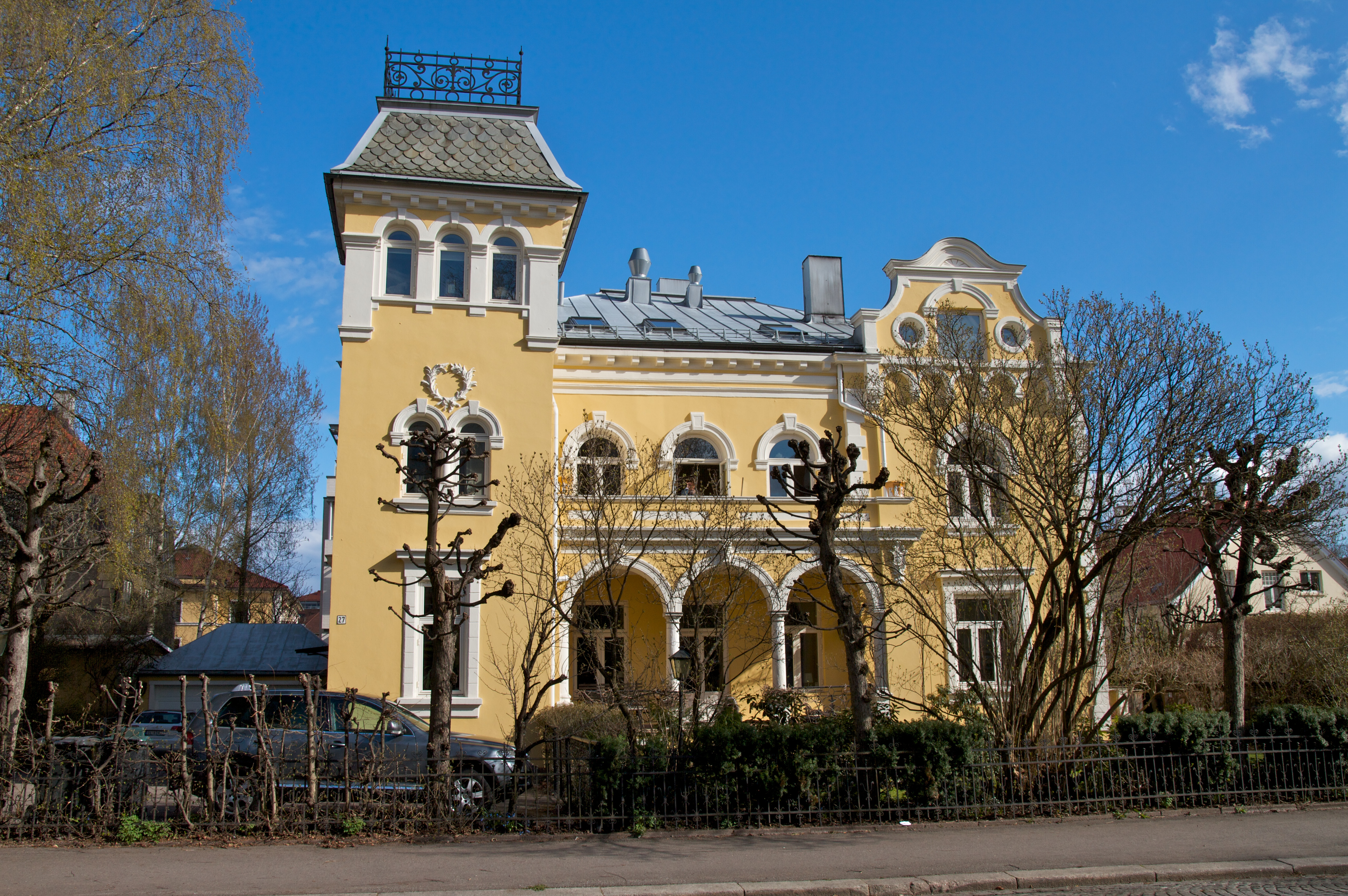 Tidemands gate 27, Frogner i Oslo.